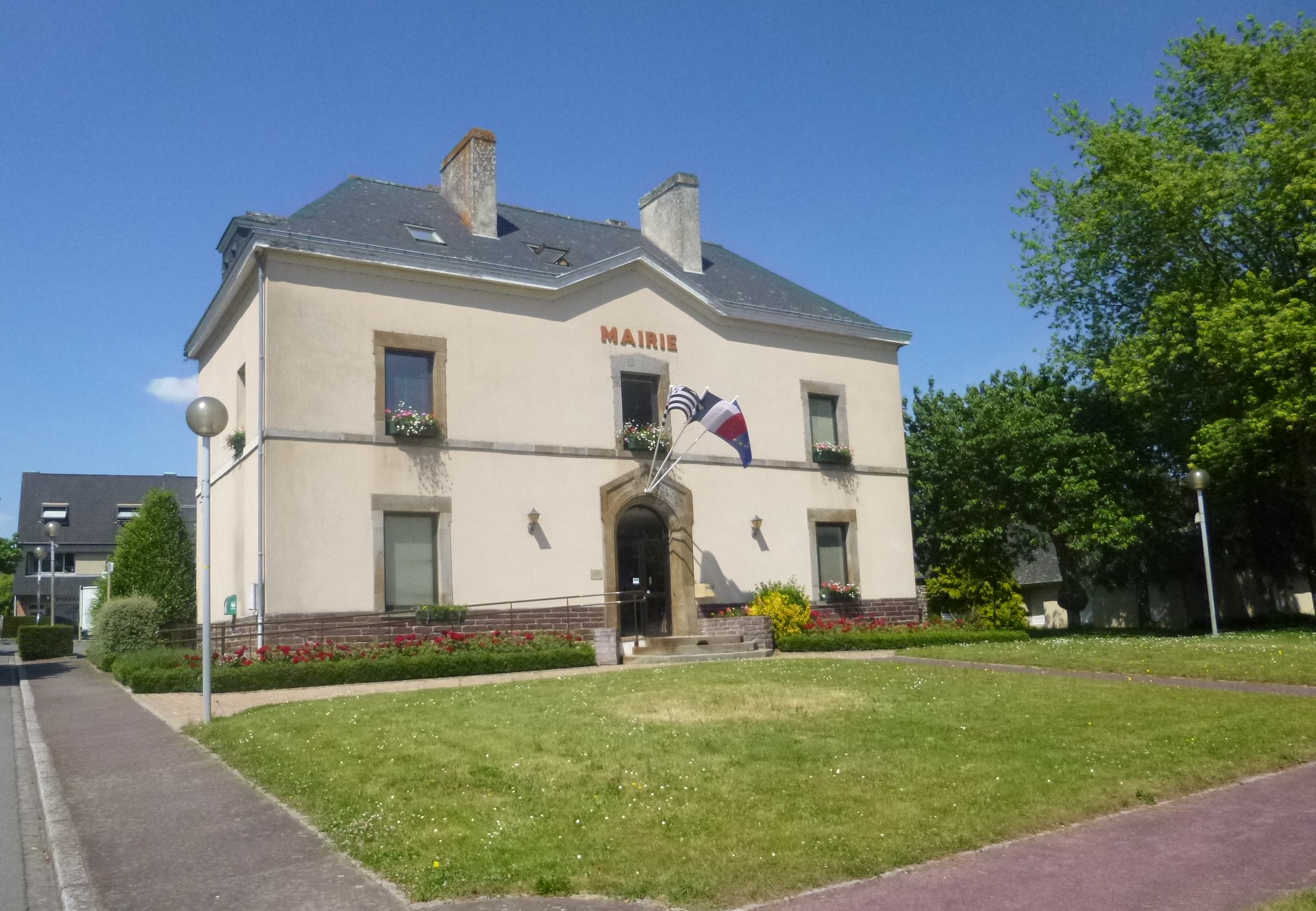 La façade sud de la mairie de Chavagne